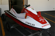 Mota de Reconhecimento e Salvamento Aquático 01. Associação Humanitária de Bombeiros Voluntários de Paço de Arcos. Paço de Arcos, Oeiras, Portugal.